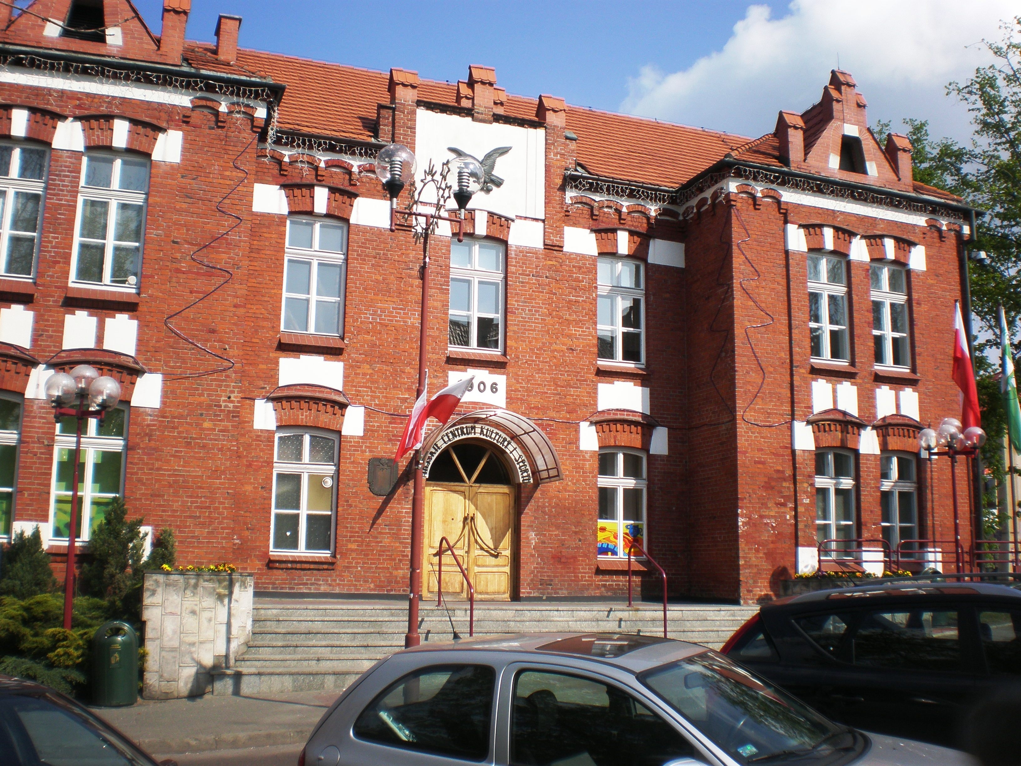 Budynek Miejskiego Centrum Kultury w Jaworznie.